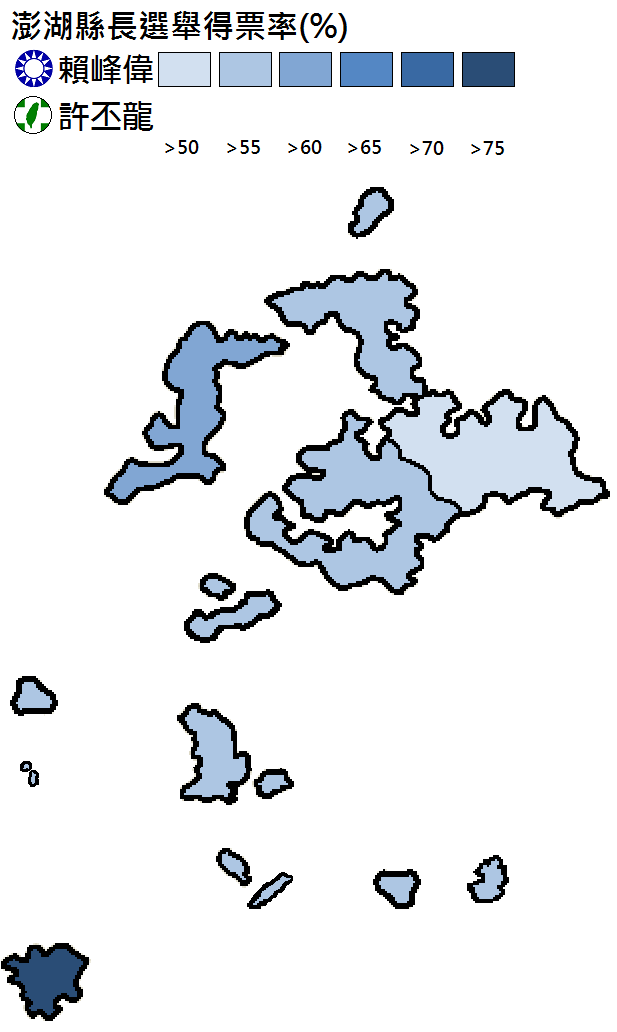 1997年澎湖縣長選舉